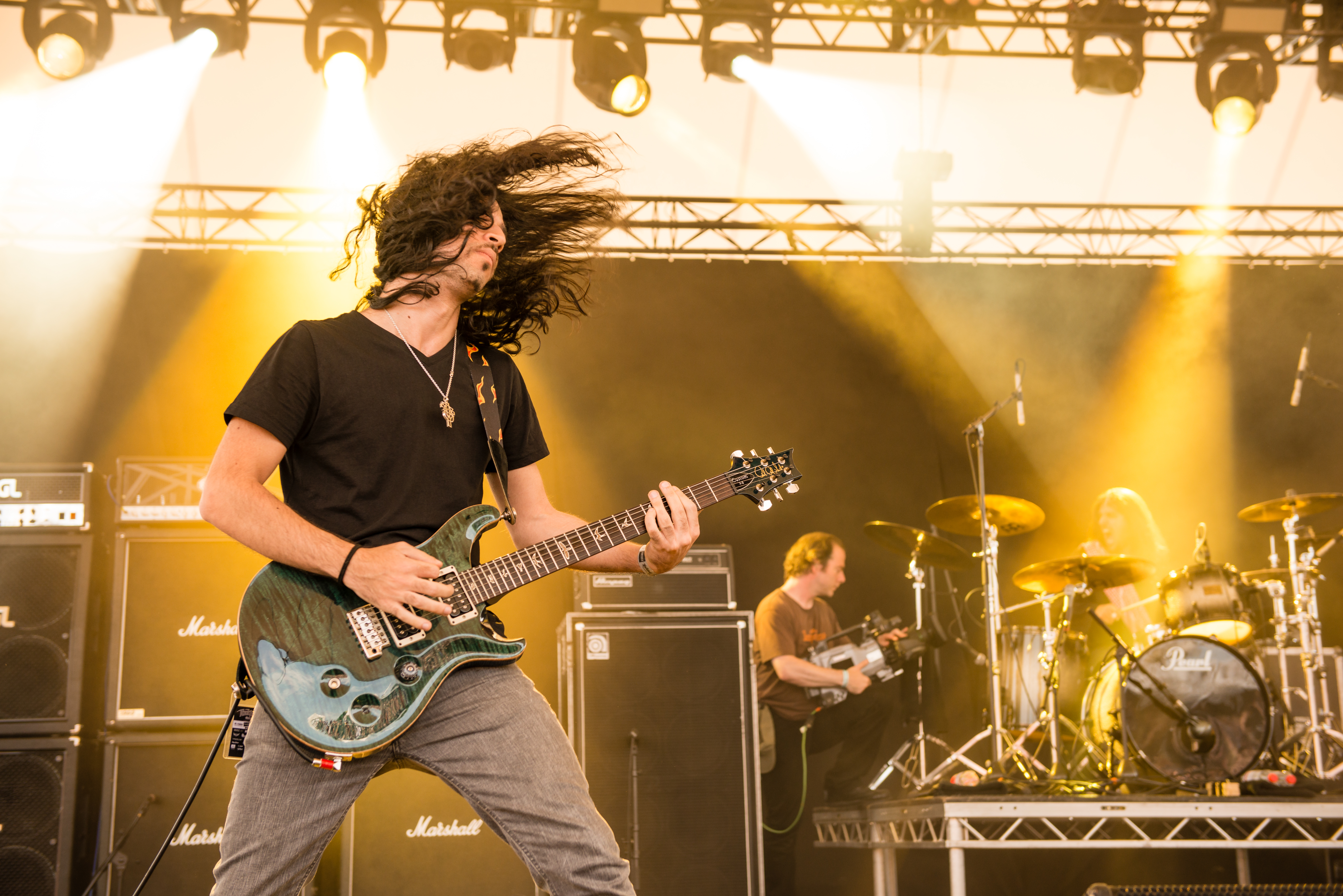 'Rock Hard Festival 2014 - Gelsenkirchen': 'Orphaned Land'